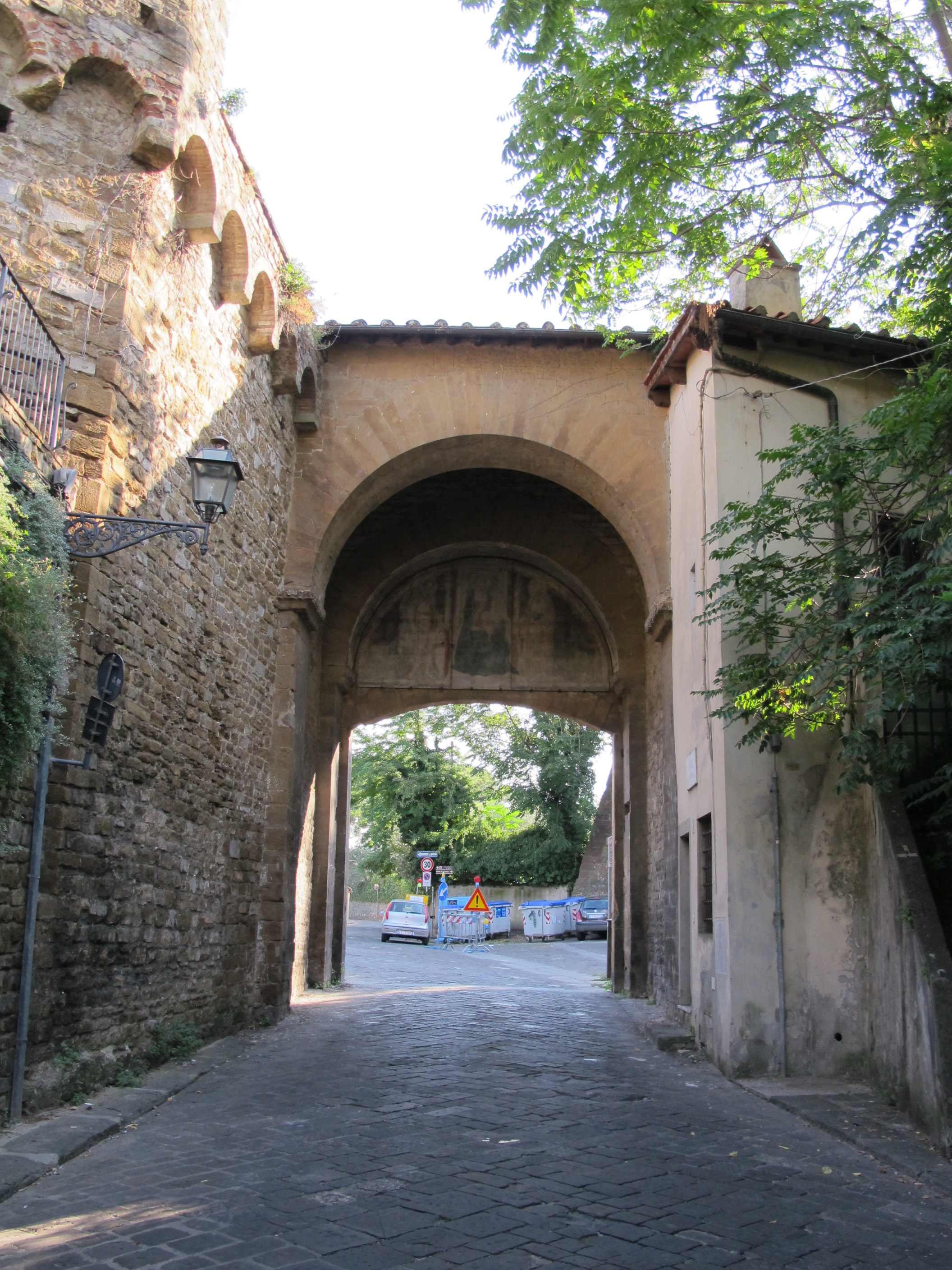 Porta san giorgio, interno